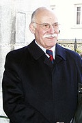 Michel Crauste accueille Raymond Kopa (de dos) lors des obsèques de Jean Prat à Lourdes.